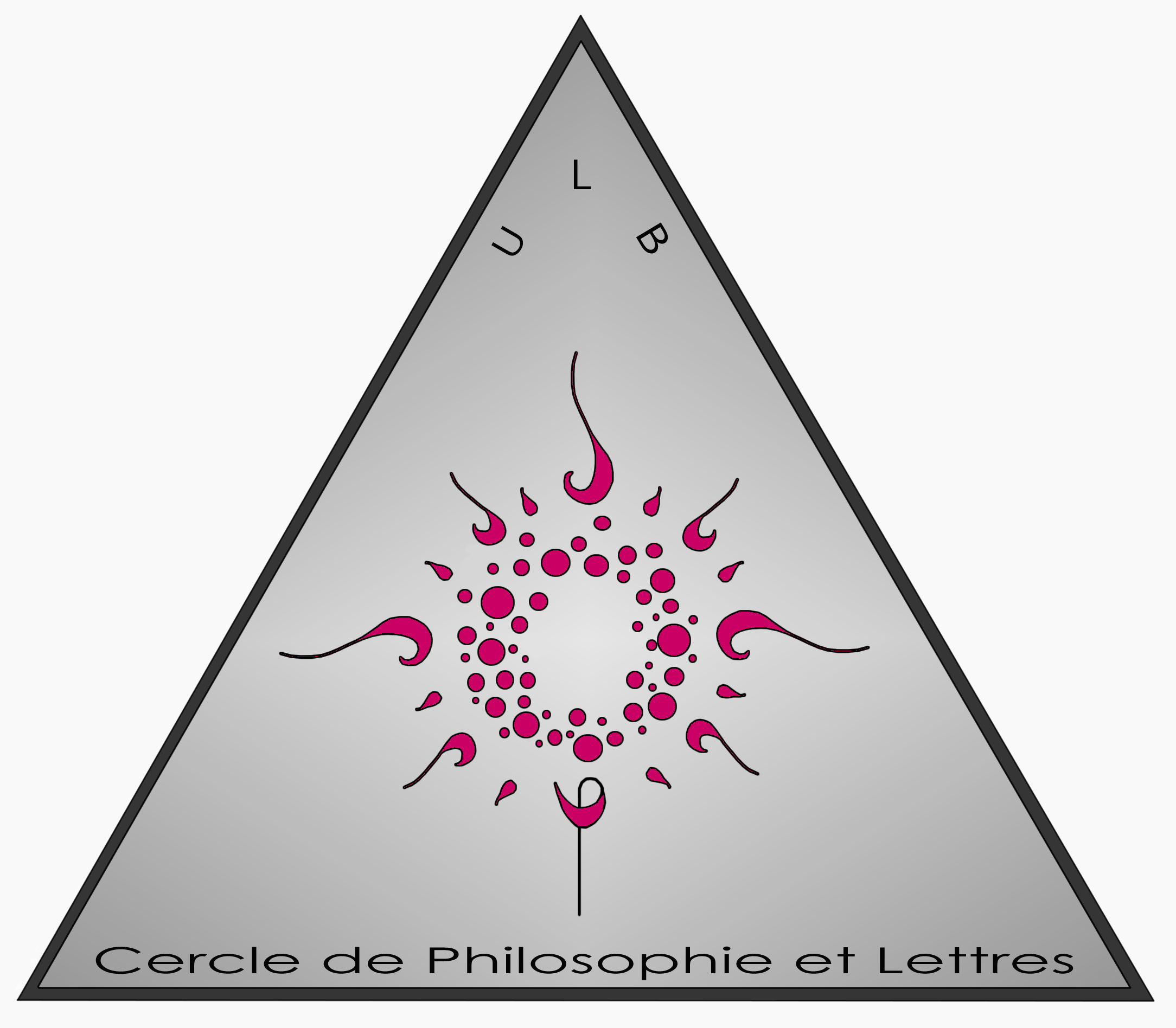 Simplement le symbole du CPL